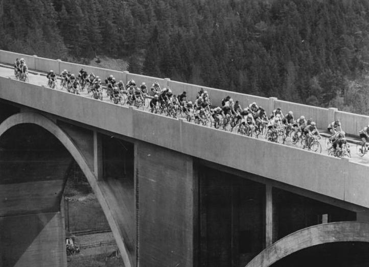 VIII. Friedensfahrt, Fahrerfeld Zentralbild CTK-II Bey-Ho 6.5.1955 - 4. Etappe der VIII. Internationalen Friedensfahrt. Am 5. Mai absolvierten die Teilnehmer des 8. Internationalen Friedensrennens die vierte und längste Etappe in der Tschechoslowakei von Tabor nach Karlovy Vary, die 215 km lang war. Sieger der vierten Etappe wurde J. Krivka (Tschechoslowakei) vor Werschinin (UdSSR), Georgieff (Bulgarien) und Schur (DDR). UBz: Die Teilnehmer der Friedensfahrt passieren die Klement Gottwald-Brücke bei Pisek.